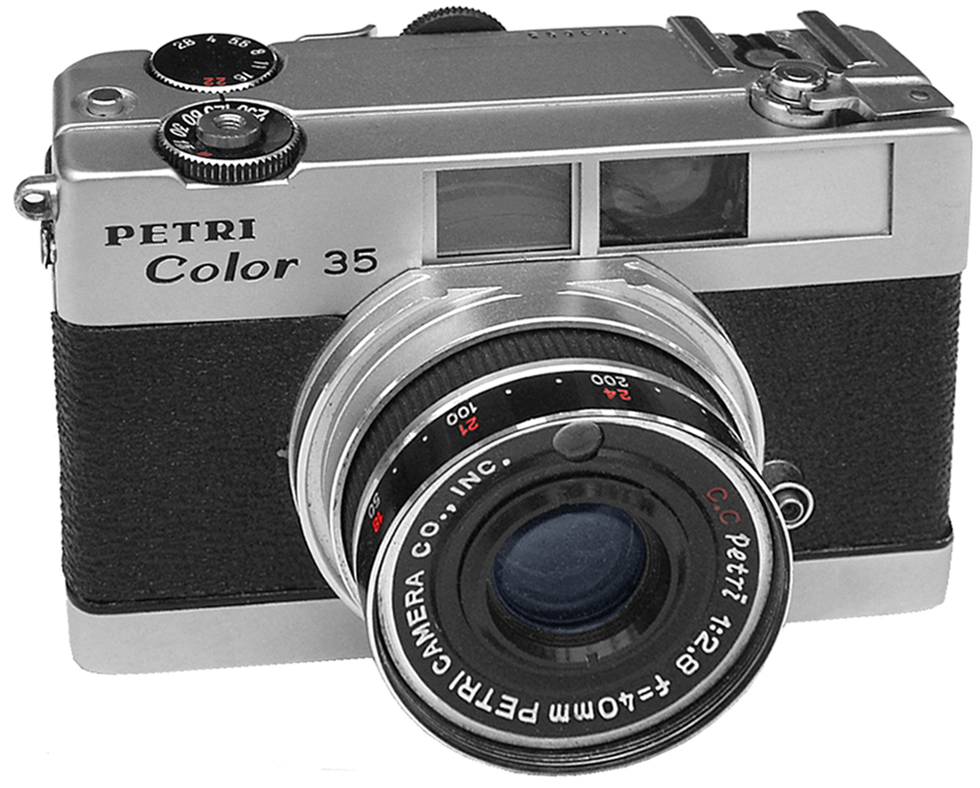 Ein unverwechselbares und cleveres Design hat diese wunderbare Kleinbild-Kompaktkamera. Obwohl sie keinen Entfernungsmesser und keine Belichtungsautomatik besitzt, macht es riesig Spaß, sie zu bedienen: Alles sitzt an der richtigen Stelle: Je ein Einstellrad für Blende und Belichtungszeit findet man auf der Oberseite. Sie lassen sich, ohne die Kamera abzusetzen, bedienen. Im Sucher wird der richtige Abgleich dann angezeigt. Dort ist auch die Entfernungsskala in Meter und feet zu sehen. Originellerweise wird die Entfernung aber nicht am Objektiv eingestellt, sondern an einem Rad auf der Rückseite, das sich ebenfalls ohne abzusetzen bedienen lässt! Dreht man dieses Rad über unendlich weiter, legt sich das Objektiv flach ans Gehäuse an, ist somit geschützt und macht die Kamera noch kompakter. Die Rückspulkurbel ist äußerst robust und lässt sich bündig im Gehäuse versenken. Das Objektiv hat die Brennweite 40 mm und eine Anfangsöffnung von 2,8. Es ist ein Vierlinser mit einer Spitzenleistung. Blitzanschluss ist über den „heißen Schuh“ und über eine Buchse möglich. Die nicht mehr erhältliche 675er Quecksilber-Batterie lässt sich durch eine billige Hörgeräte-Zelle ersetzen. Man braucht sie eh nur für den Belichtungsmesser, der Verschluss (1/15 – 1/250 s, B) ist rein mechanisch. Die Stromversorgung wird übrigens immer nach dem Auslösen ausgeschaltet, erst der Filmtransport schaltet sie wieder ein. Abmessungen: ca. 100x65x30 mm (ohne Obj.). Gewicht: ca. 390 g.